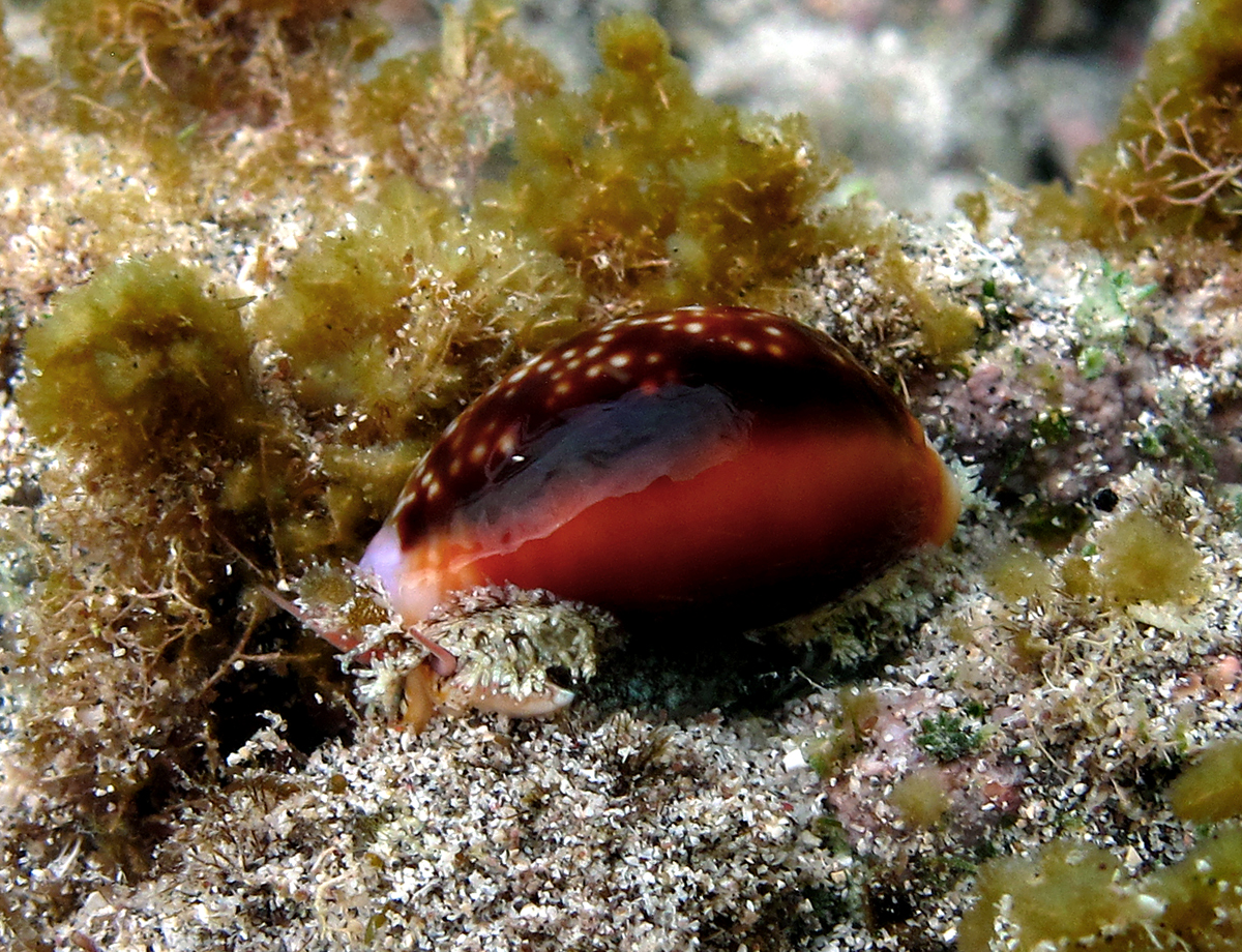 Le gastéropode Erosaria helvola à la Réunion.